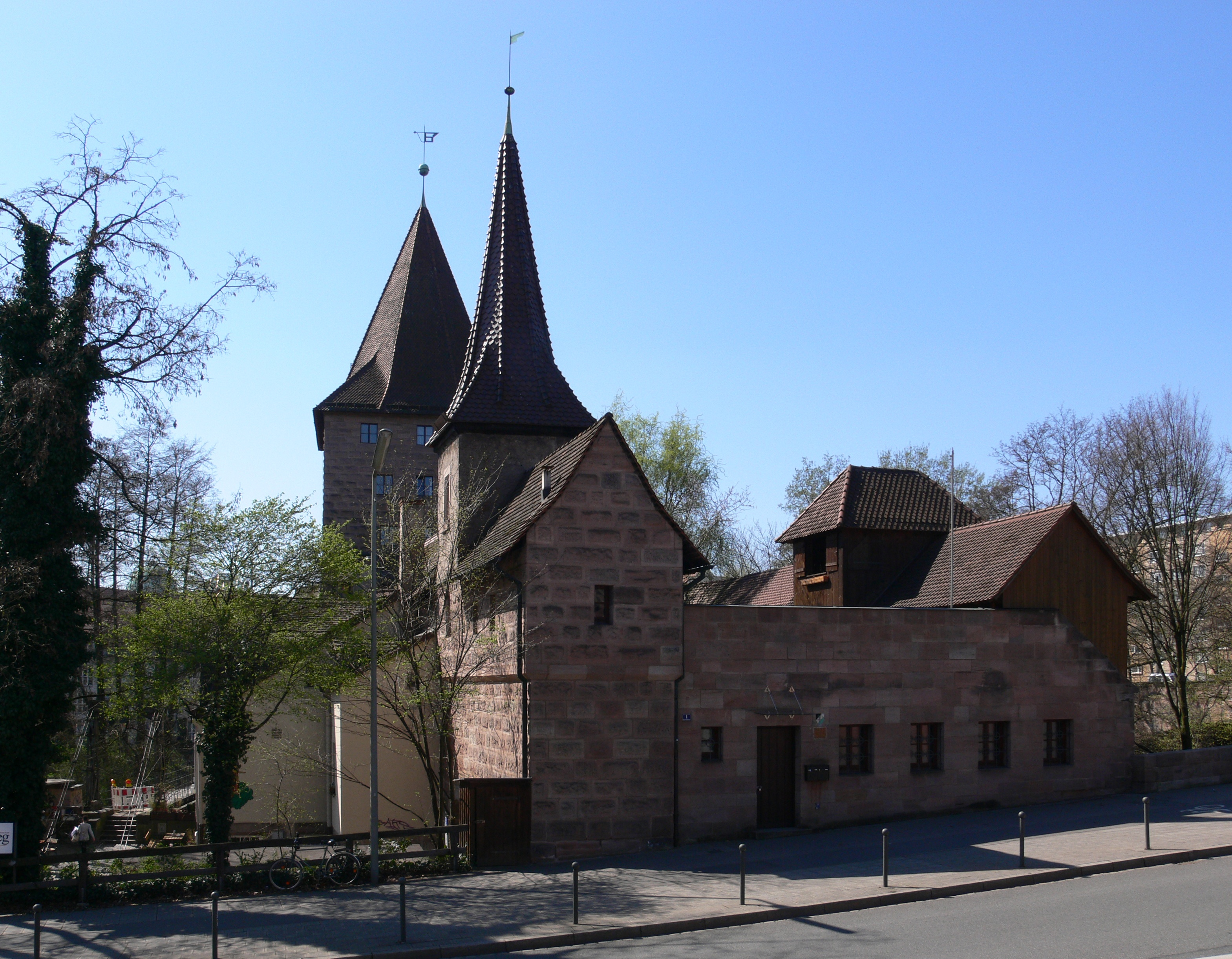 Nürnberg, Hallertürlein (Turm „Grünes G“), von Norden gesehen vom Mauerdurchbruch „Hallertor“, im Hintergrund der Schlayerturm „Grünes F“